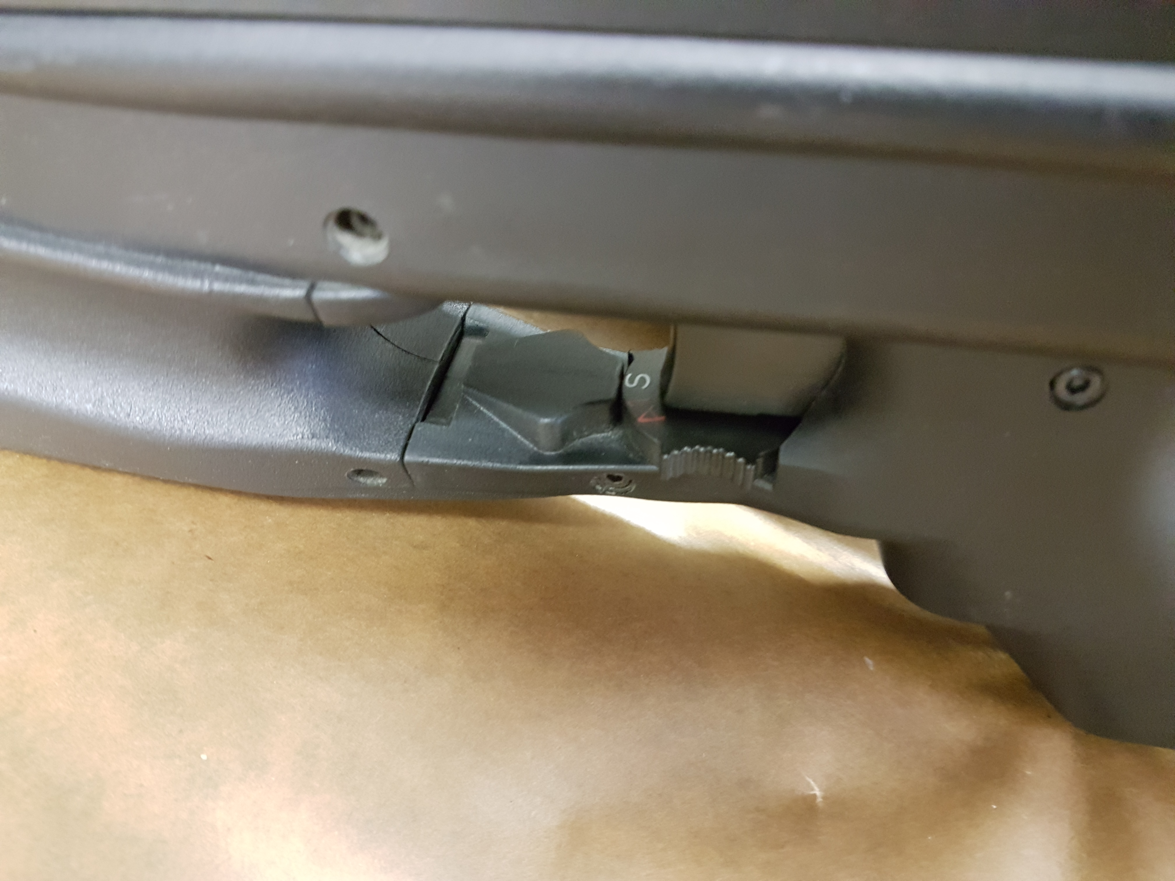 Varovalo pri puški FN 2000, Belgijske izdelave. S-zaklenjeno, 1-posamično, A-avtomatsko streljanje